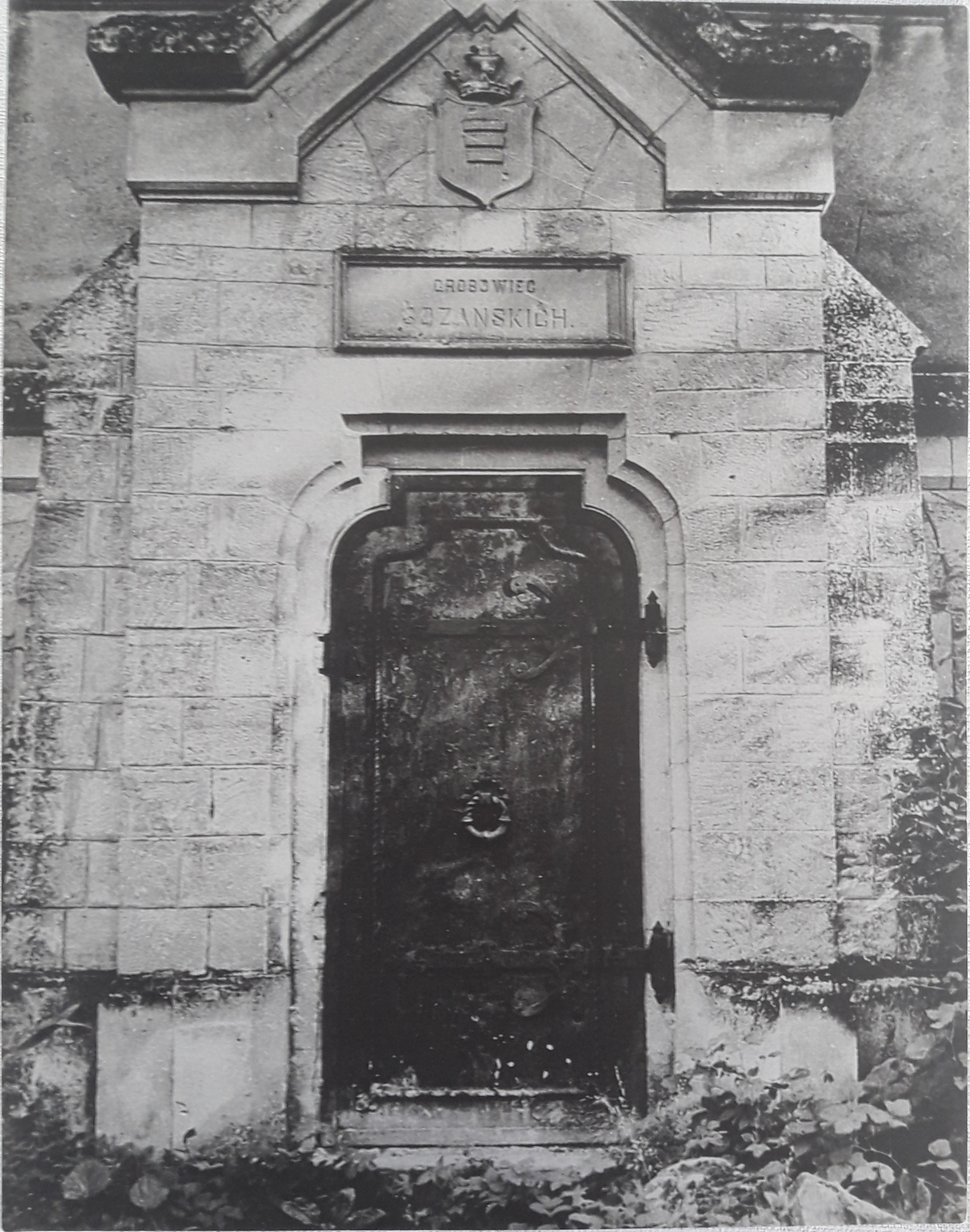 Entrée du mausolée de la famille Sozanski.